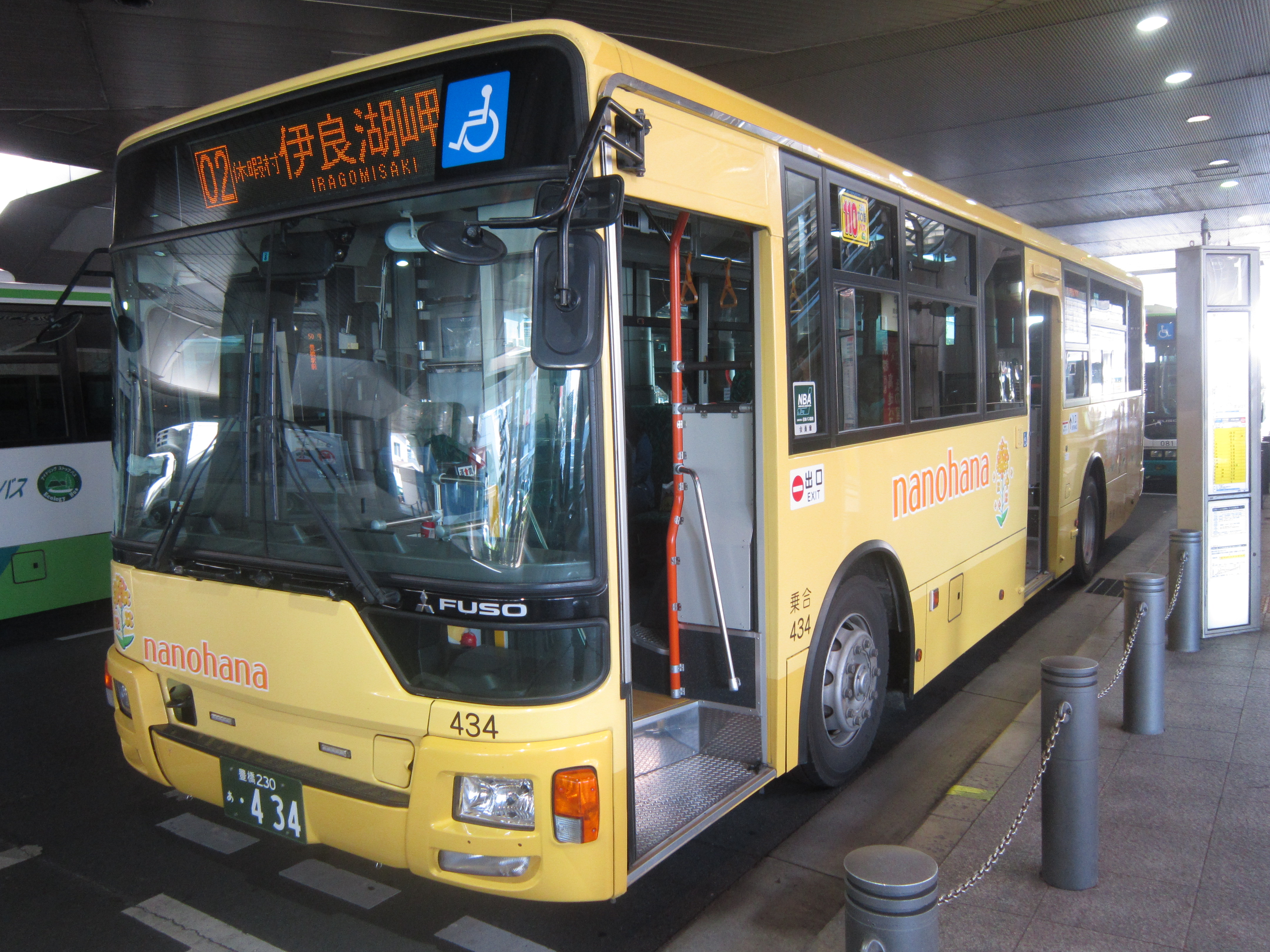 渥美営業所所属乗合434